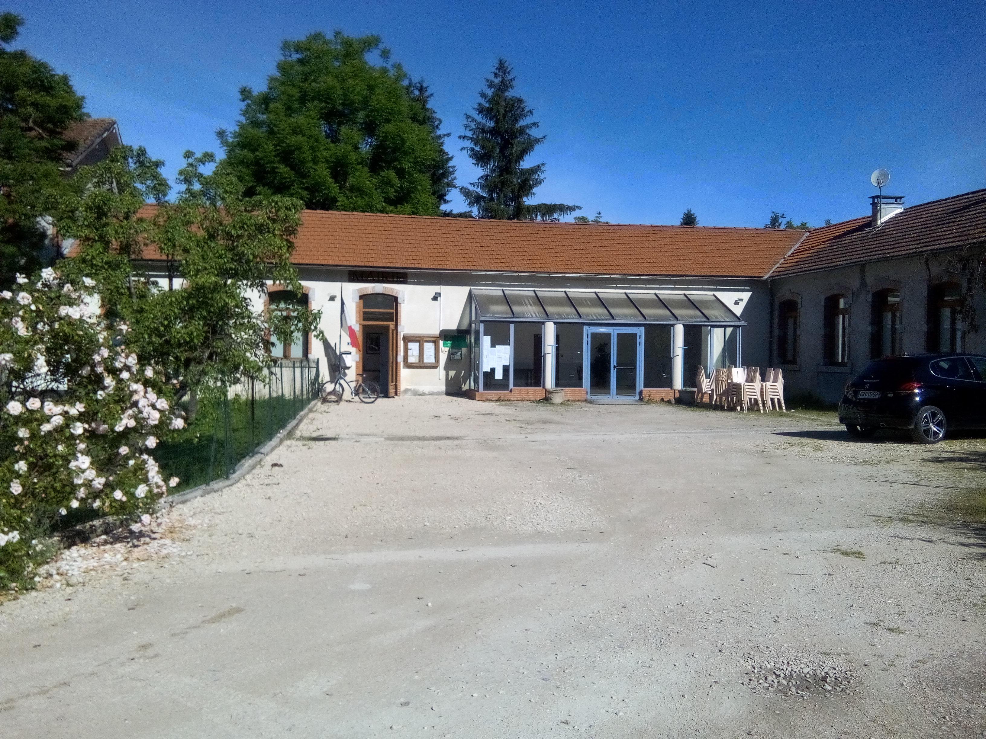 Mairie de Lacave (Ariège, France)